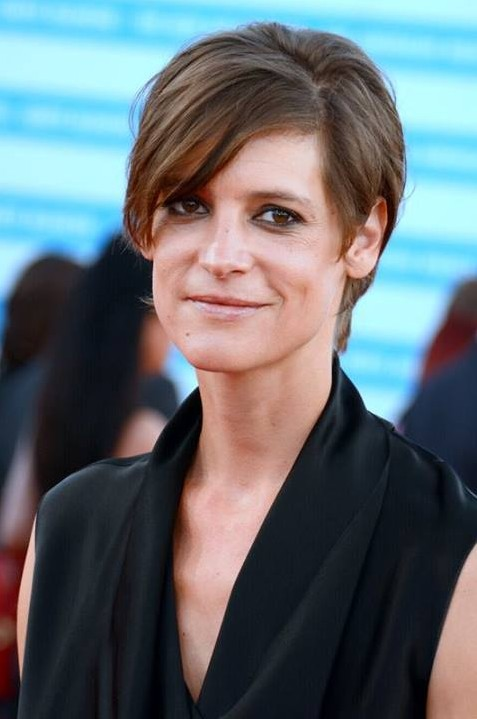 Hélène Fillières au festival de Deauville